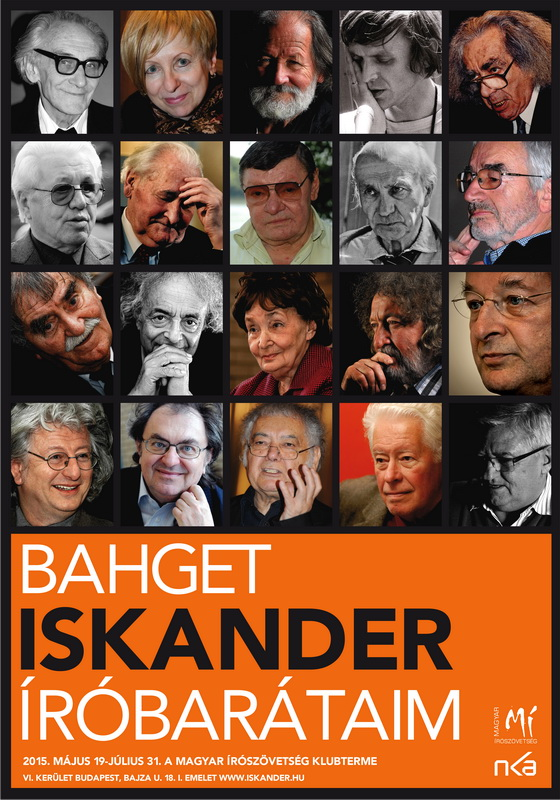 Bahget Iskander Íróbarátaim című kiállításának plakátja